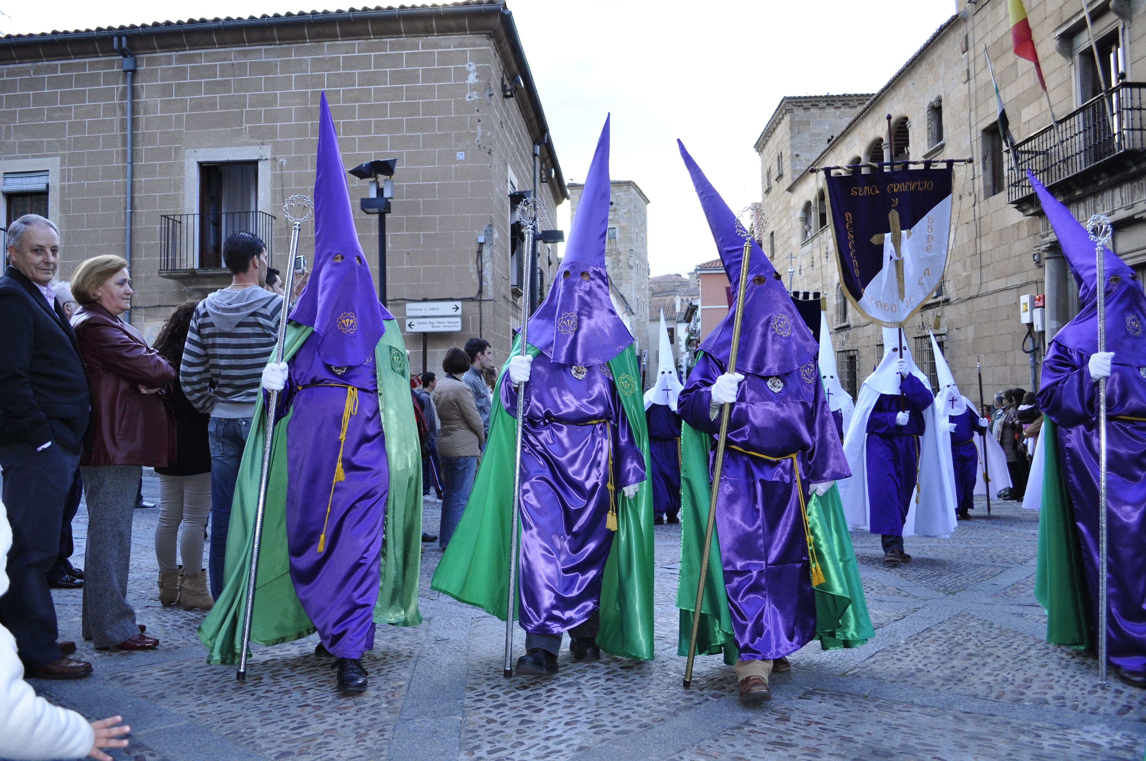 Cofradia de la Soledad y Santo Sepulcro. Hermano Mayor: Narciso Juanals Parroquia: Santo Domingo Año de Fundación: Comienzos del Siglo XV Hermano Mayor: Narciso Juanals Hora de salida: 19,30 horas Pasos:Nuestra Señora de la Soledad, Santo Sepulcro, San Juan María Magdalena y San Pedro Acompañamiento musical: La banda de música de la OJE de Plasencia Número de hermanos de la cofradía: 700 (